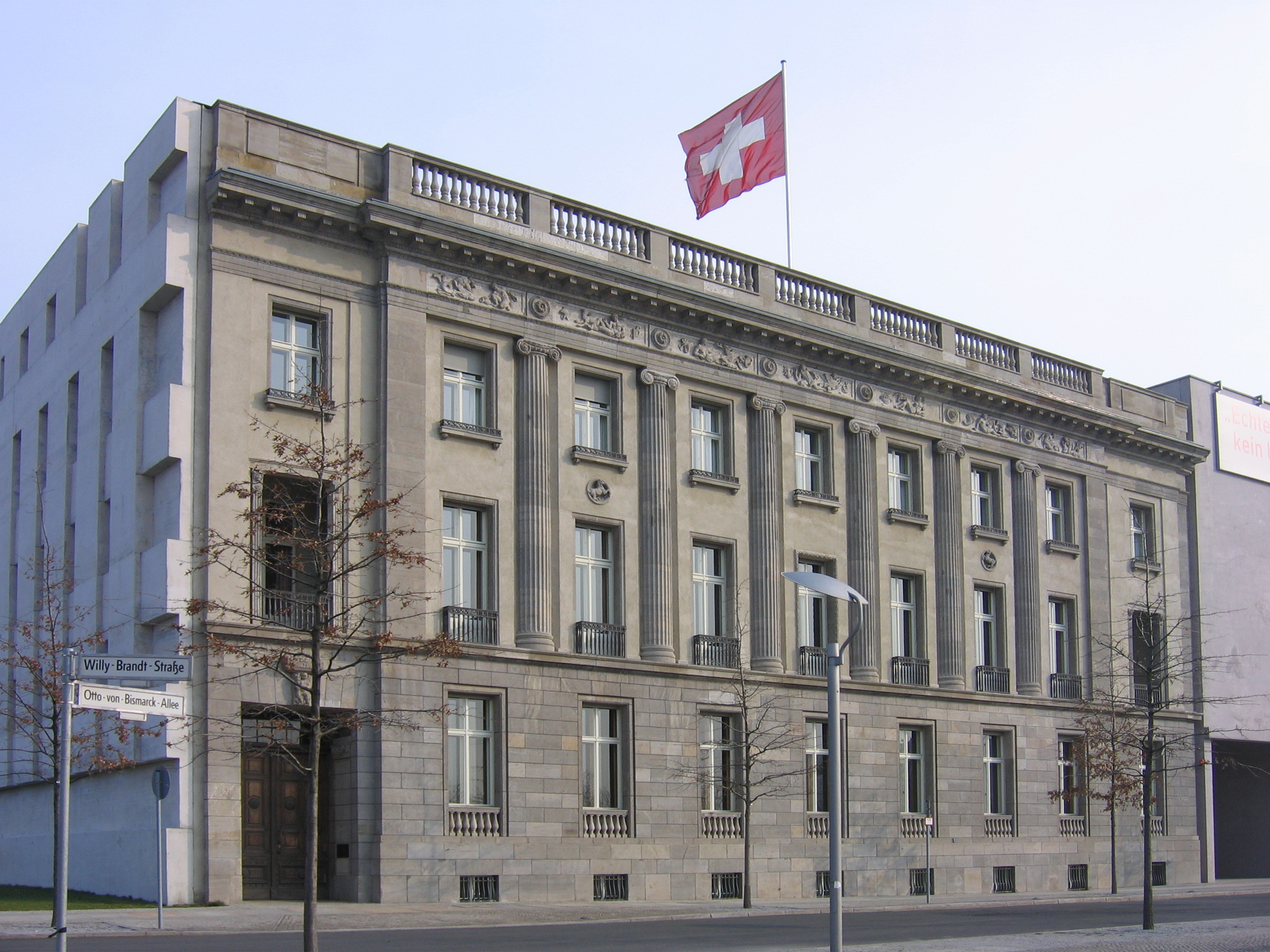 Swiss embassy in Berlin.